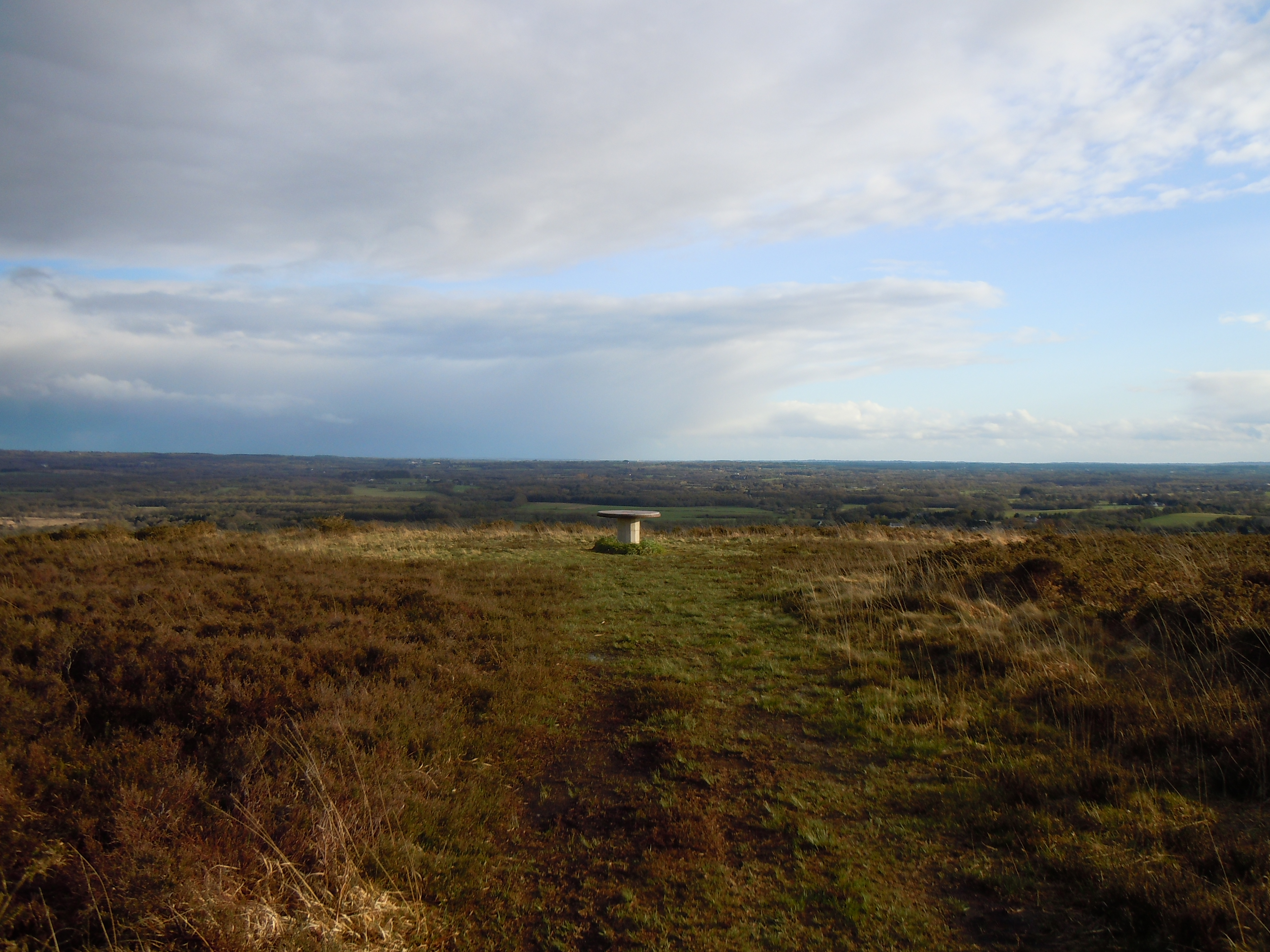 le sommet de la calotte saint Joseph et sa table d'orientation (commune de Langonnet dans le département du Morbihan)